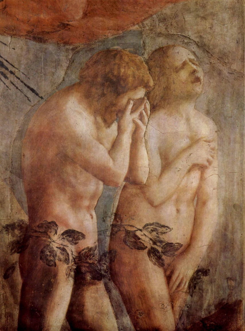 detail